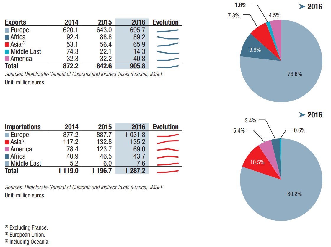 Структура внешней торговли Монако 2013-2015